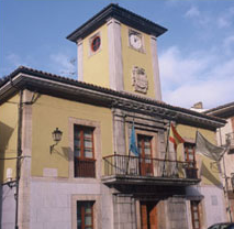 Imagen del Ayutamiento de Belmonte de Miranda